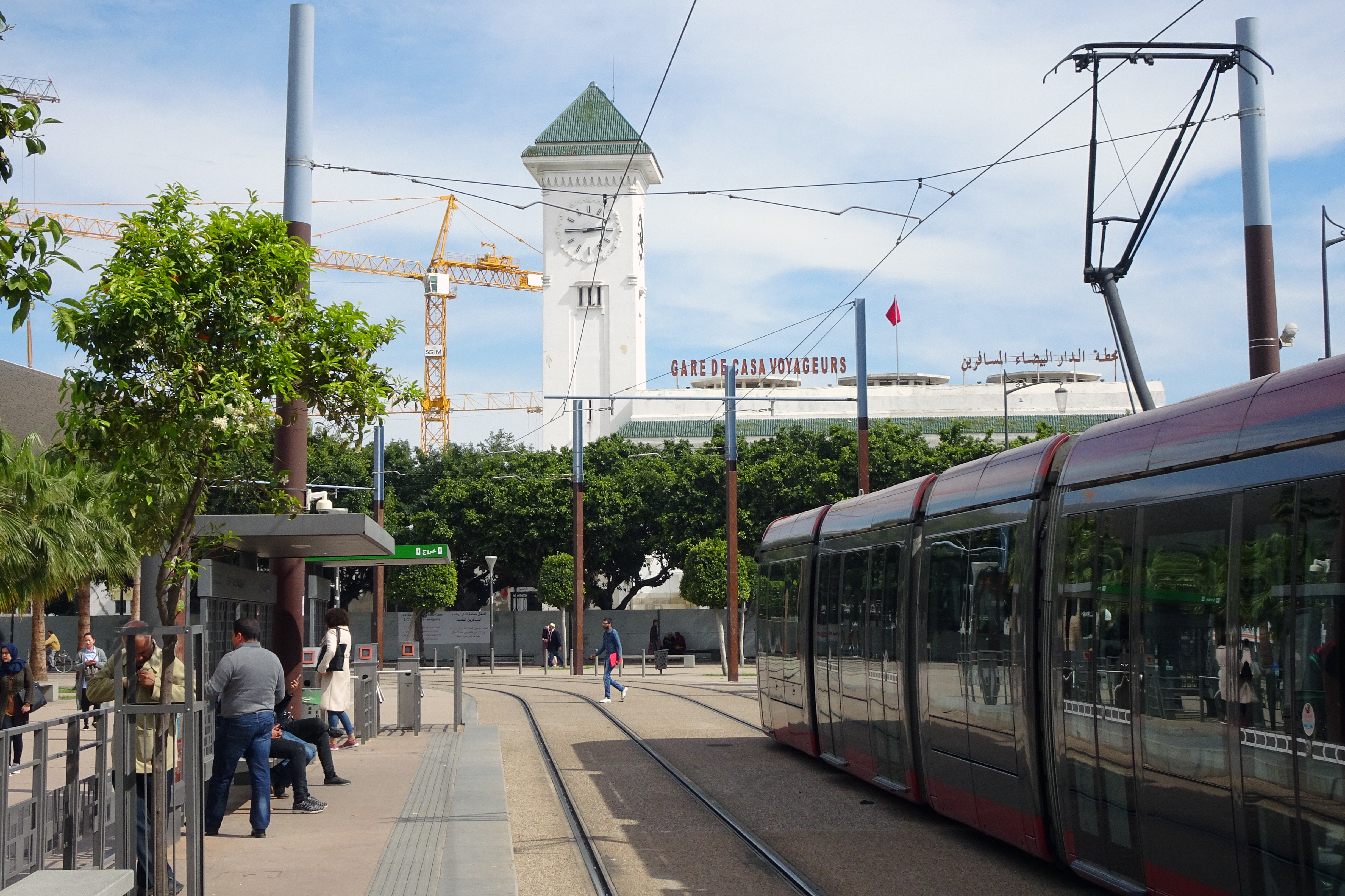 La gare Casa Voyageurs à Casablanca vue de l'arrêt de tram, sur le boulevard Mohamed V